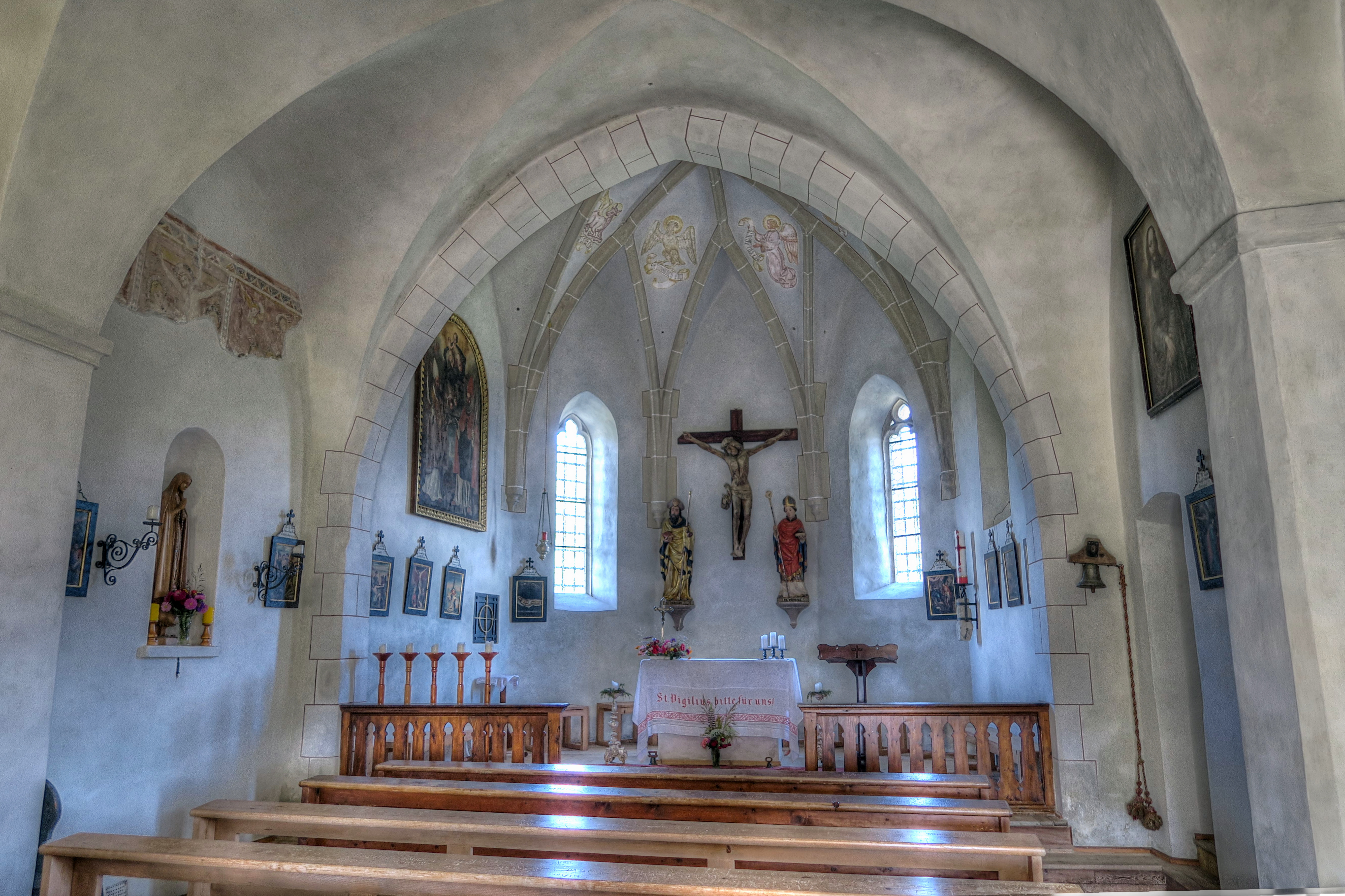 Innenraum der Kirche St. Vigilius am Vigiljoch in der Gemeinde Lana (Südtirol, Italien)